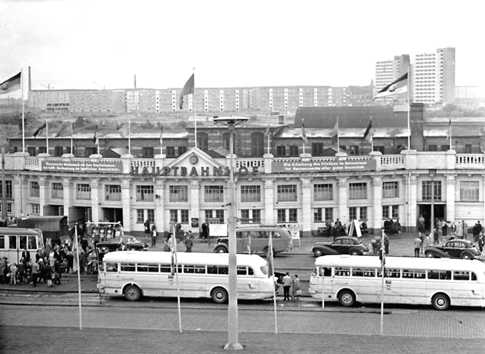 Rostock, Hauptbahnhof, Busse ADN-ZB Karnitzki-4.7.1964 We-Schm- Ostseewoche 1964. Blick auf den Rostocker Hauptbahnhof. Im Hintergrund erkennen wir einen Teil der Neubauten der Hafenstadt. (Hedemann)